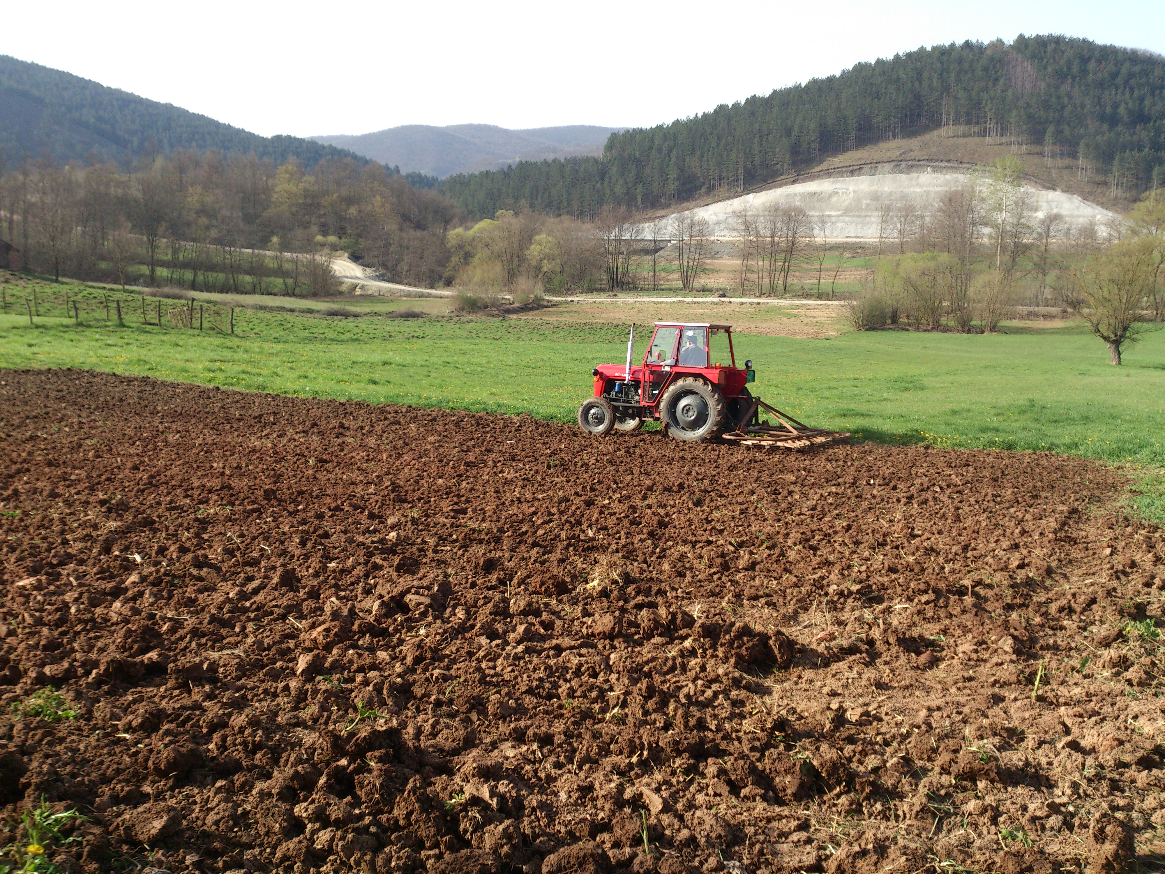 Пролећни радови, припрема баште за разне повртарске културе.